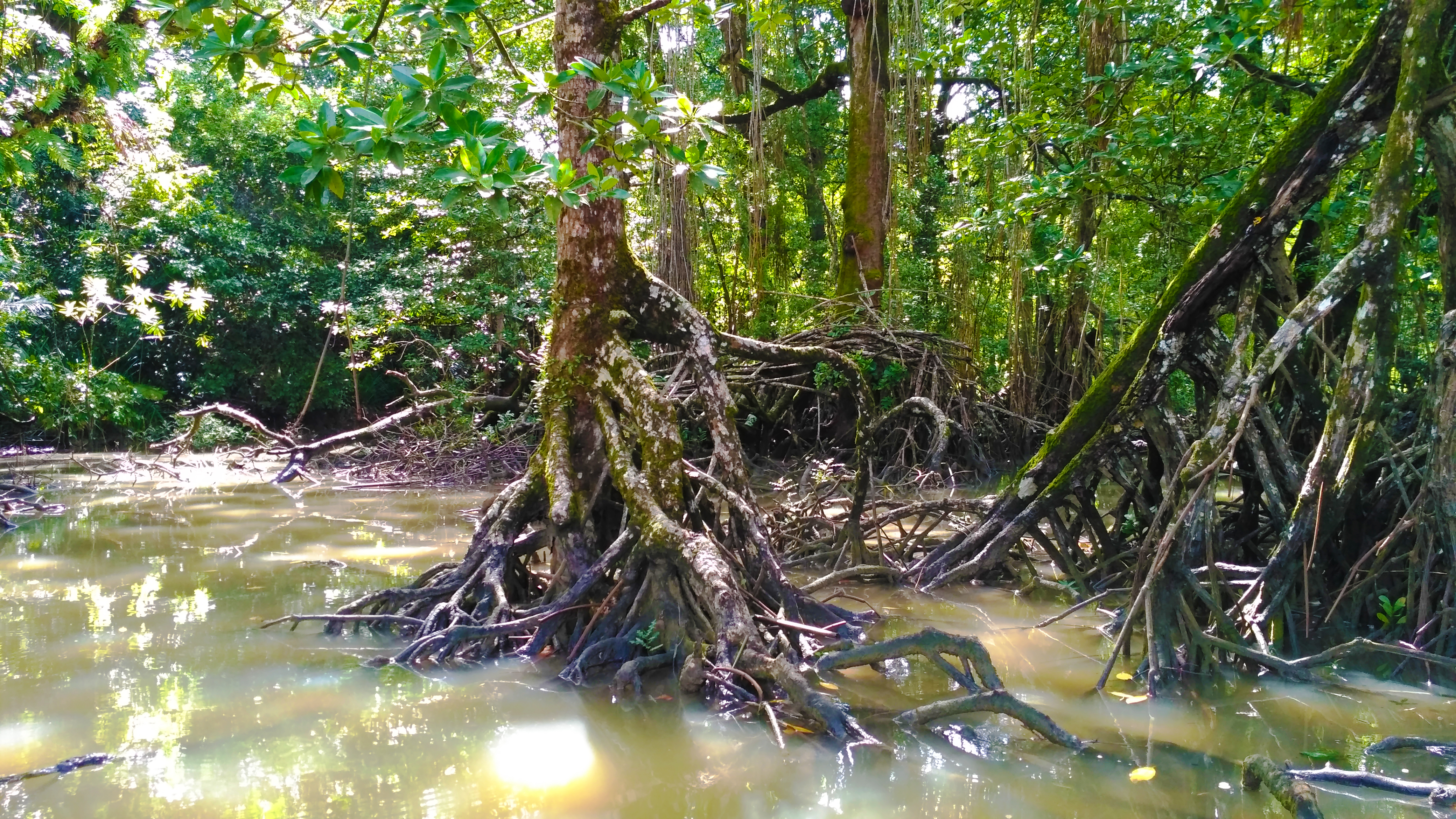 Tanaman mangrove ini telah diidentifikasi dengan menggunakan buku Flora of Java. Ditemukan di mangrove wilayah Cilintang, Taman Nasional Ujung Kulon, Banten.